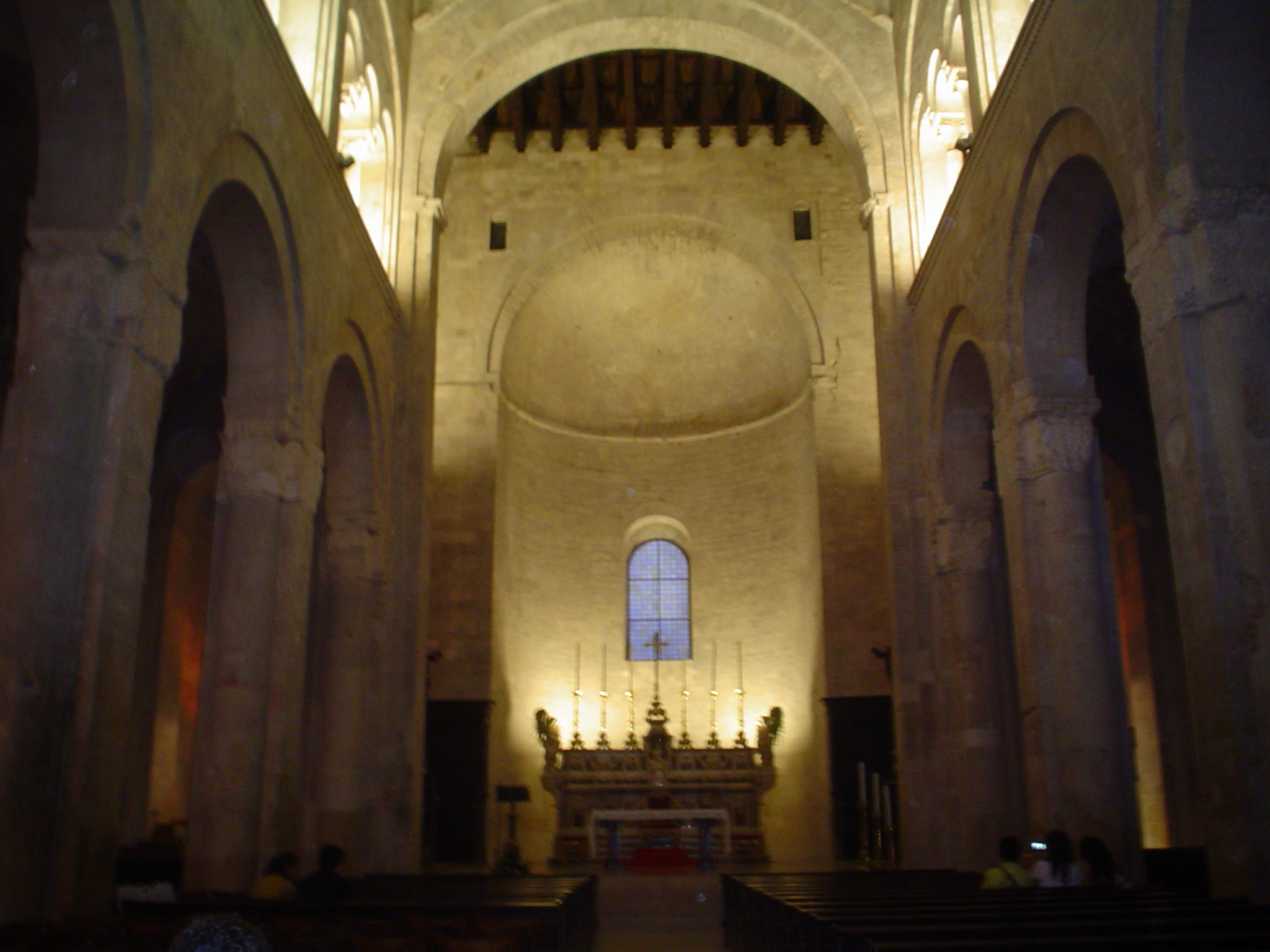 Navata centrale e parte absidale